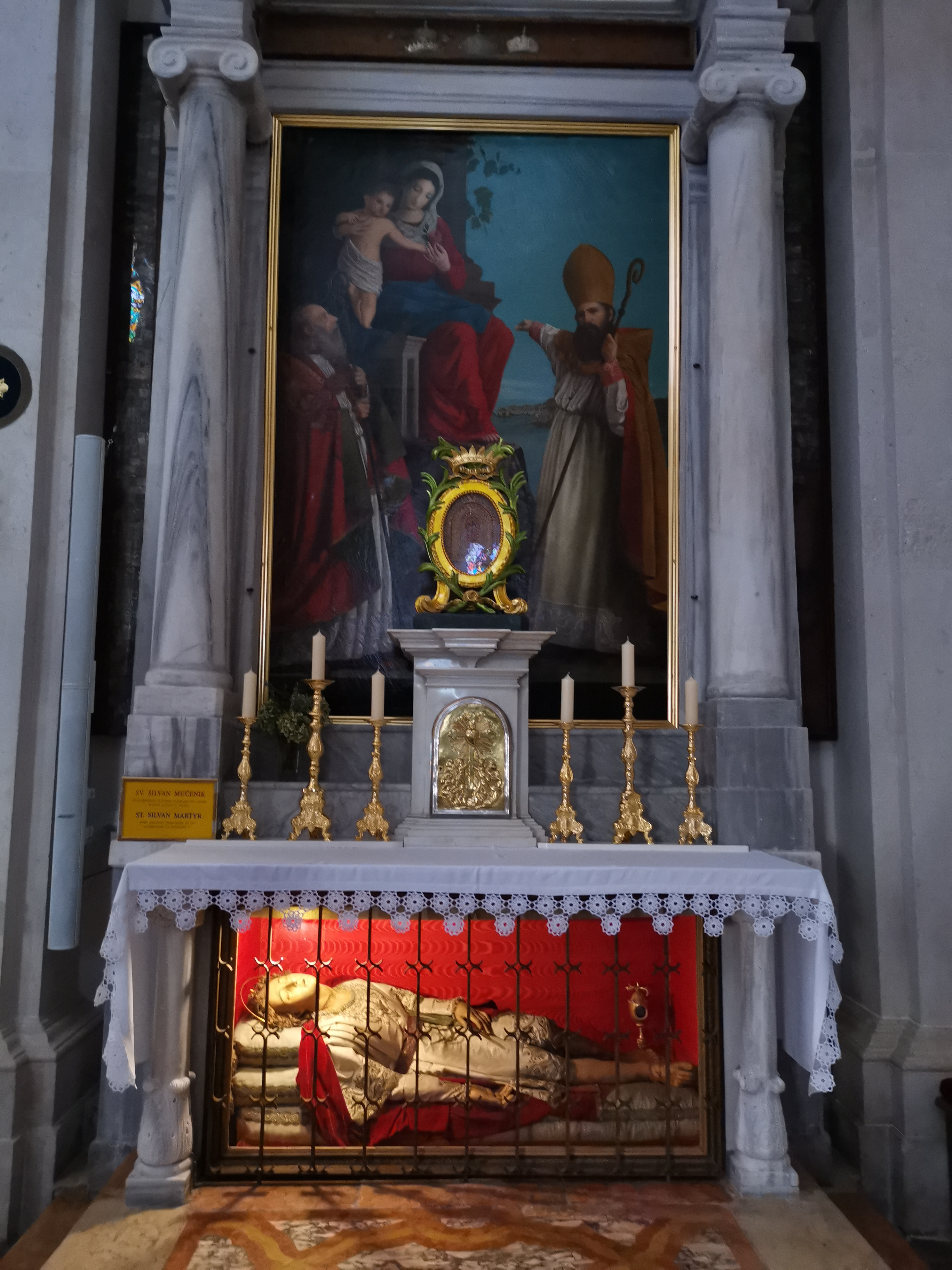 St. Blasius-Kirche innen; Heiliger Silvan